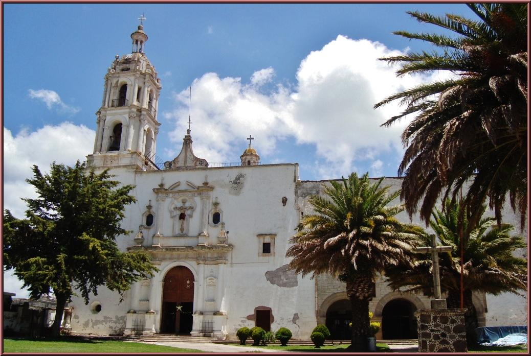 By Catedrales e Iglesias Album 2642 Álbum 2342 Diócesis de Tulancingo SINGUILUCAN, HGO. Tit. San Antonio Dom. Casa Parroquial, C.P. 43780 Tel. (775) 75 5 29 33 Este año, se contempla que la celebración anual sea enfocada al patrono del lugar. Imagen albergada en la iglesia del mismo nombre, joya arquitectónica considerada como una de las construcciones más importantes a nivel estatal. Construida por los agustinos, en el año de 1540, en el interior de la capilla del siglo 17 se pueden admirar hermosas pinturas al oleo. El altar mayor es de estilo churrigueresco, único en la región. La Iglesia y exconvento, del Señor de Singuilucan, luce un portal, plateresco, además de que conduce a la Virgen de Guadalupe en su capilla del siglo XVII; el altar mayor que en su mesa tiene un frontal de espejo, ostenta un gran nicho vidriado donde se aloja un crucifijo de tamaño natural que representa la imagen del señor de Singuilucan. Existen monumentos históricos de don Miguel Hidalgo y Costilla; bustos de Heriberto García Espejel, don Benito Juárez y Niños Héroes.